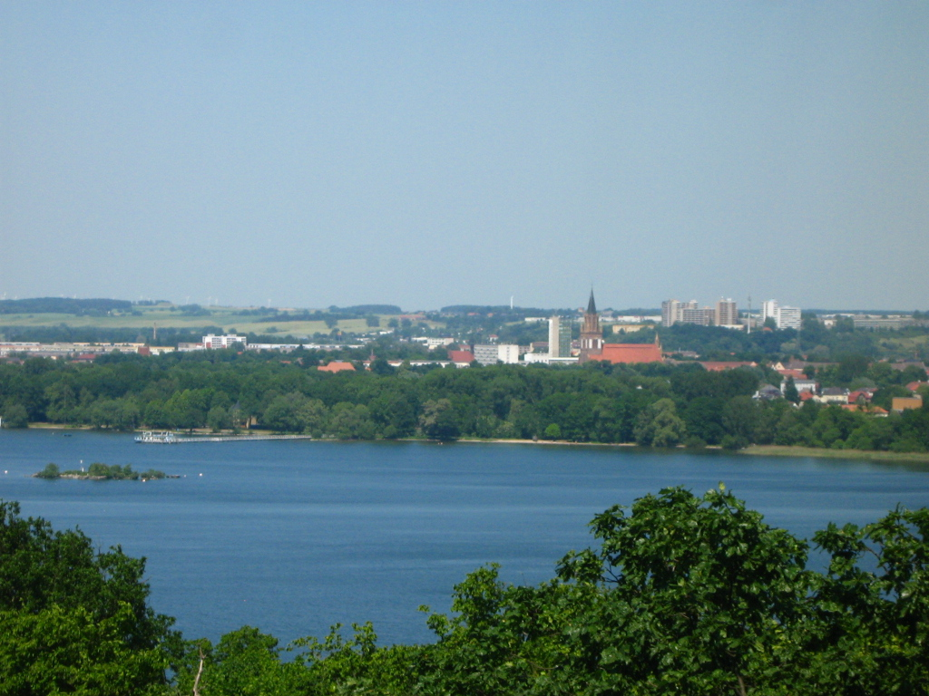 Der Tollensesee in Mecklenburg-Vorpommern. Blick in nordwestliche Richtung vom Aussichtsturm Behmshöhe auf Neubrandenburg. Der Aussichtsturm steht im Wald östlich des Sees.